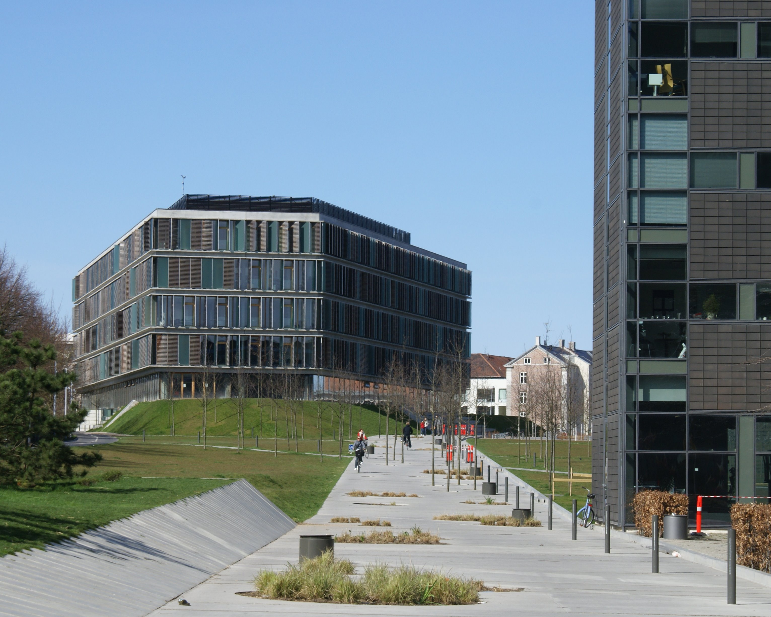 Kilen ("The wedge"), seen from Solbjerg Plads